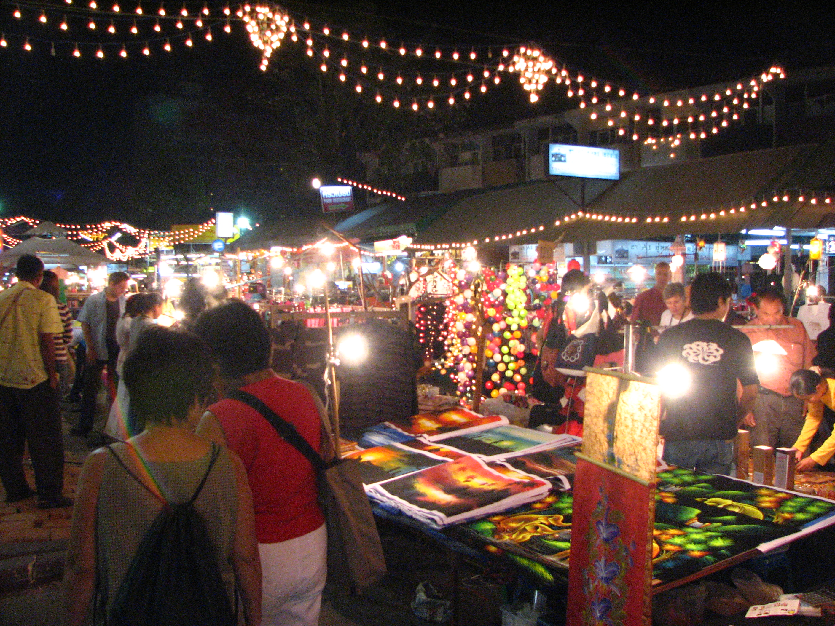 Chiang Mai Night Bazaar